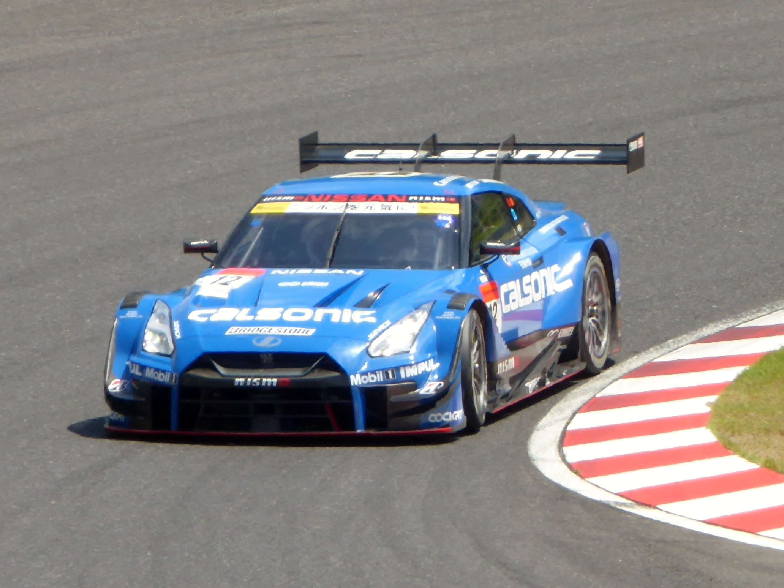 2017年鈴鹿1000㎞に於いて12号車カルソニックIMPUL GT-Rを撮影。